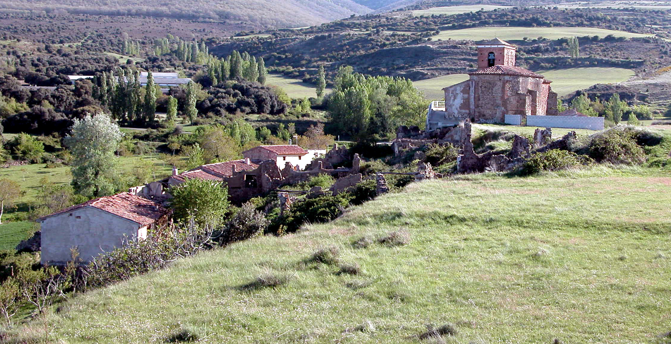 CARBONERA (Bergasa). Vista de la aldea.